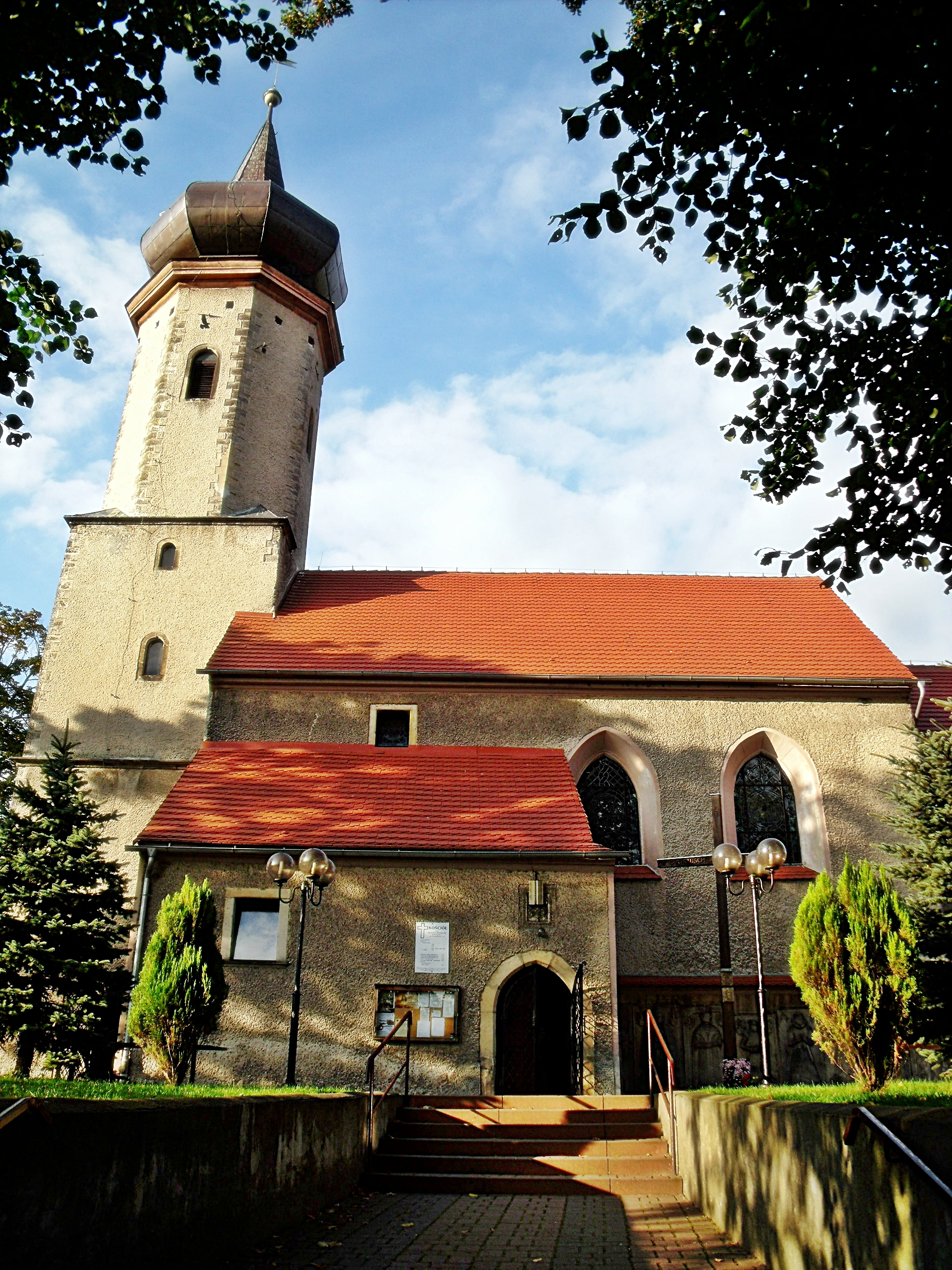 Kościół pw. Matki Bożej Różańcowej widziany od strony wejścia głównego zlokalizowanego na skrzyżowaniu ulicy Ceramicznej i ulicy Widok